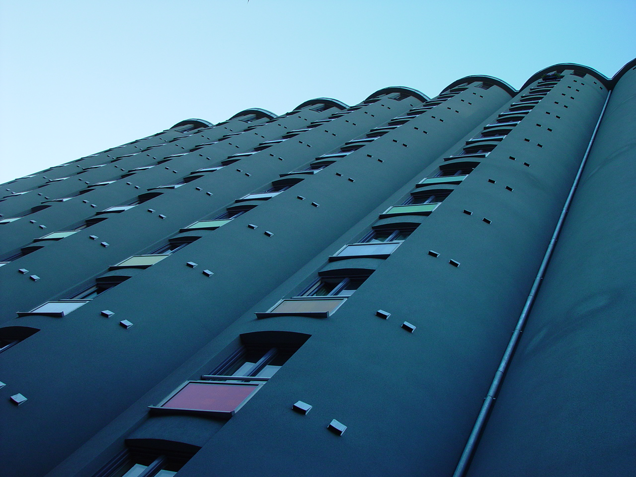 Grünerløkka Studenthus